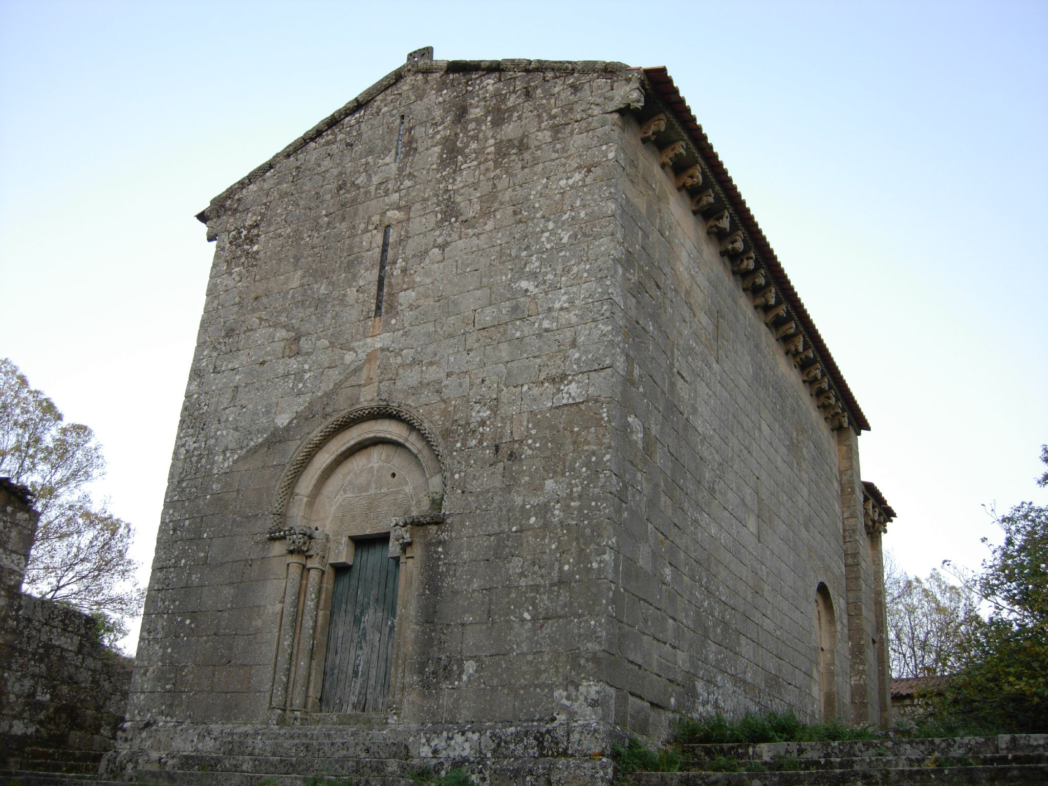 Iglesia románica de finales del siglo XII.